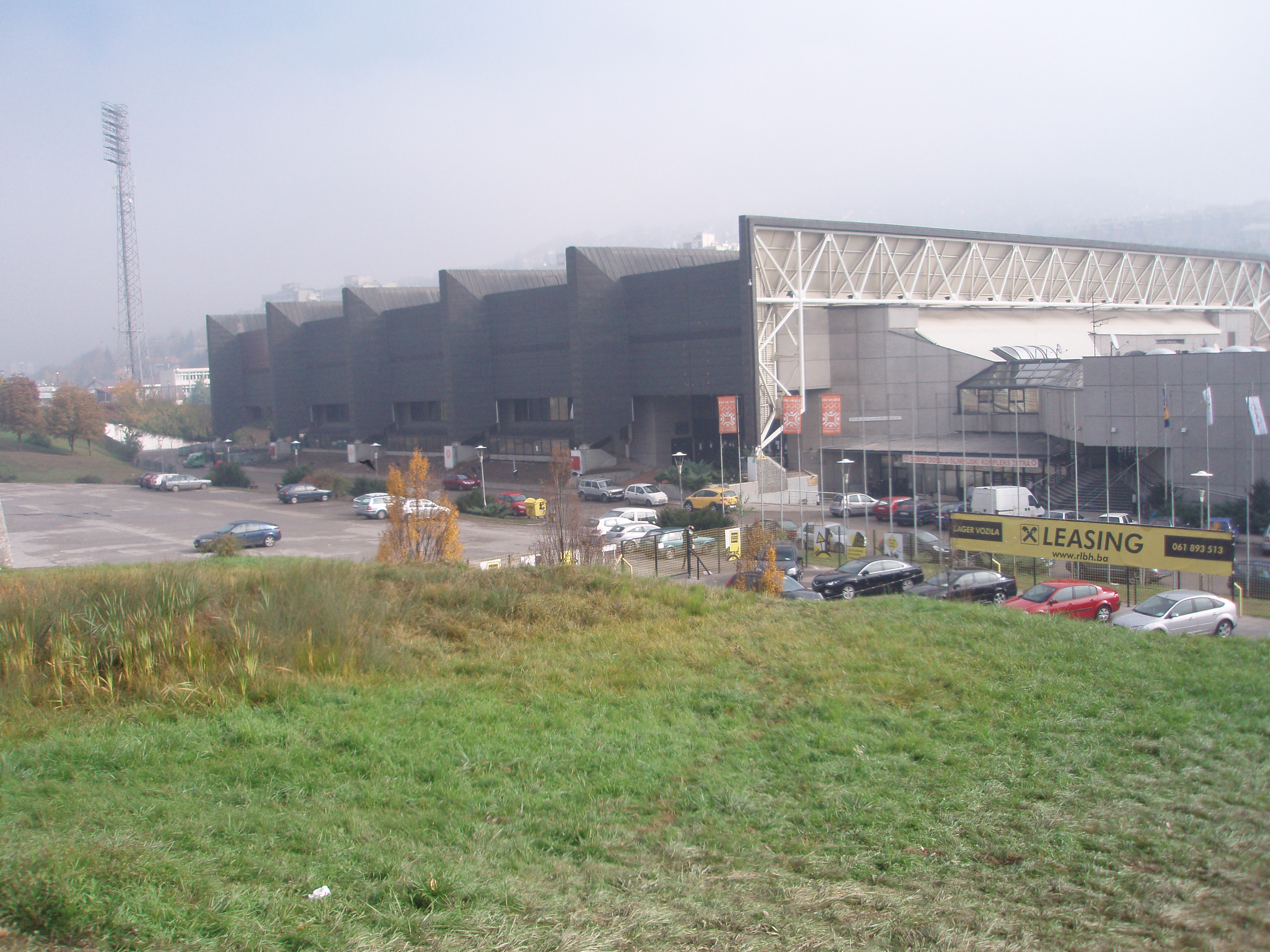 Zetra